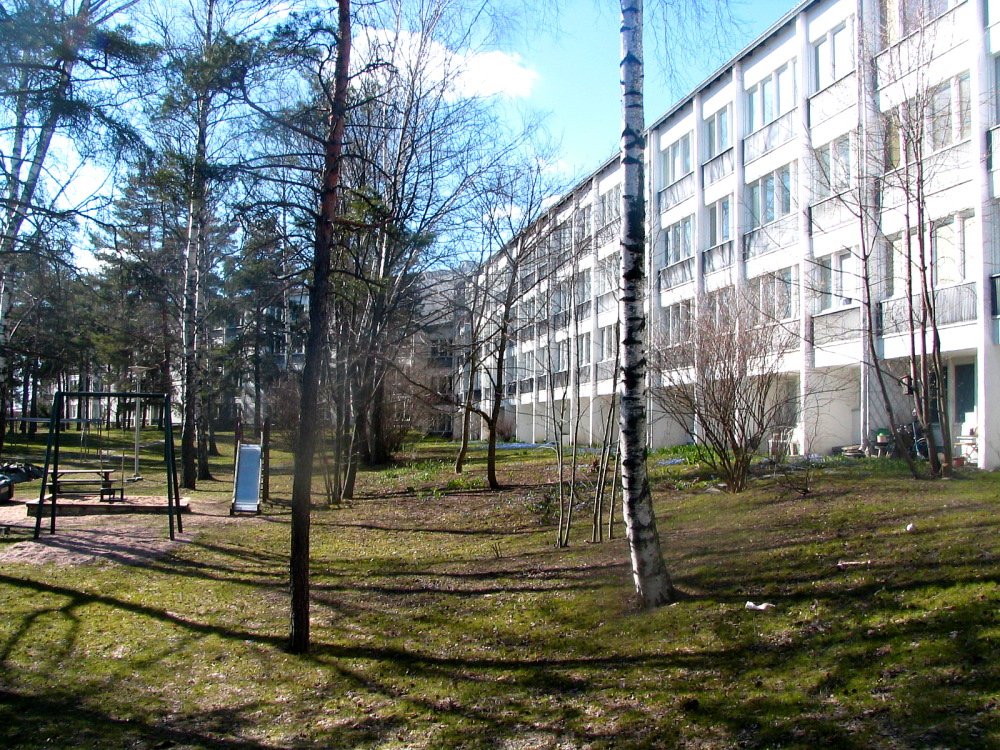 Roihuvuorentie 18. Architect Esko Korhonen. At Roihuvuori in Helsinki.